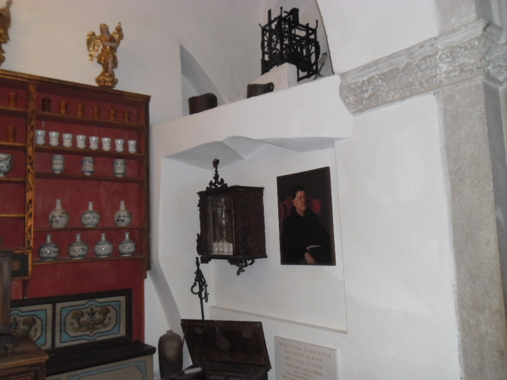 prizor iz stare dubrovačke ljekarne